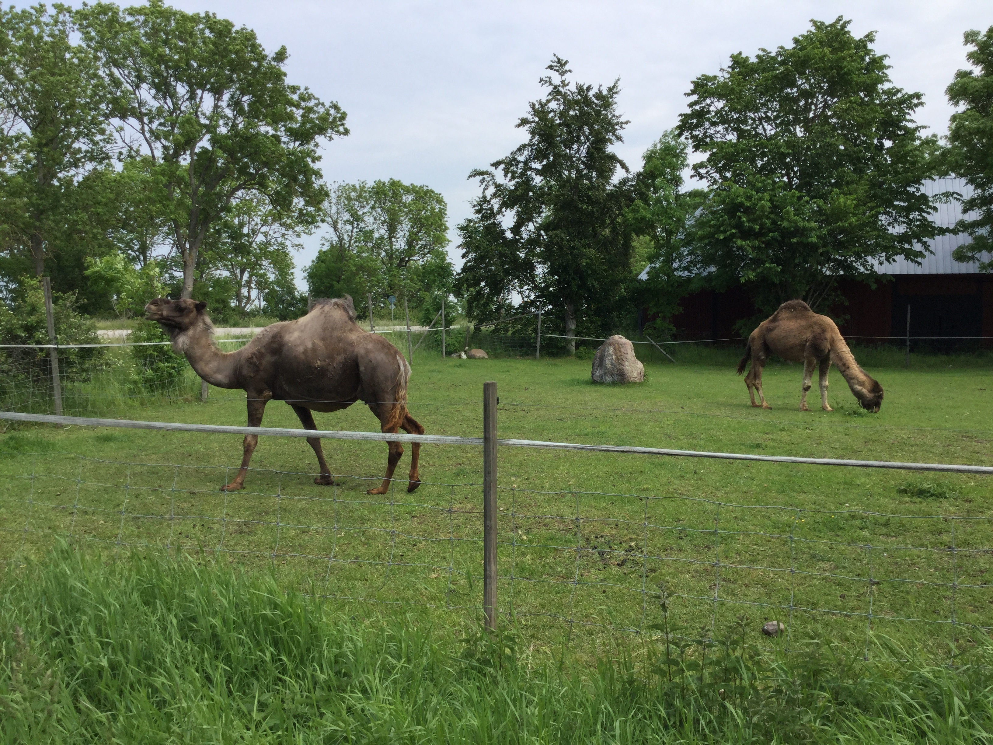 Dromedarer i Köpingsvik, Öland, i juni 1917.